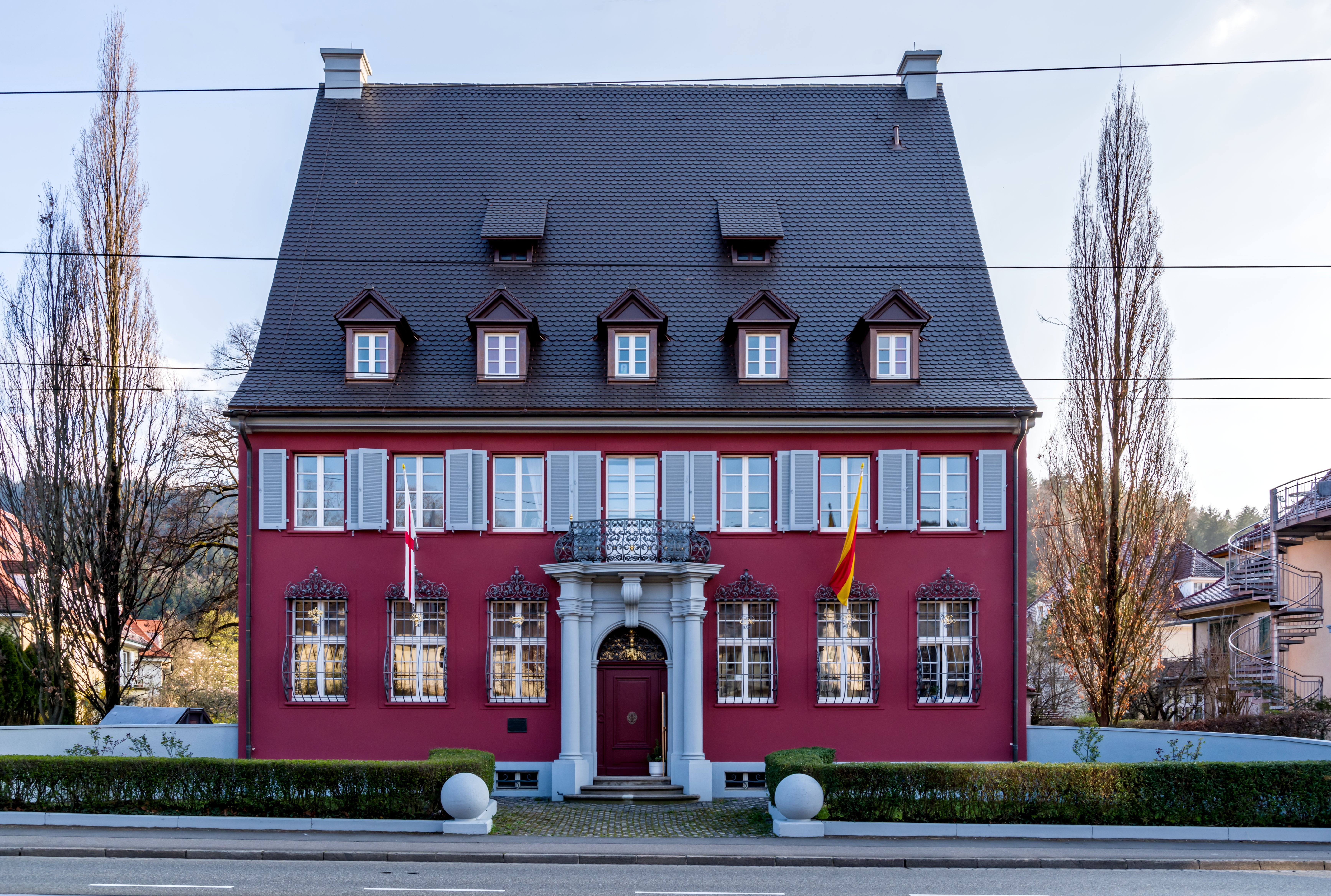 Freiburg Haus der Badischen Heimat in Originalfarben Das Haus der Badischen Heimat trägt wieder die Originalfarbe, Badische Zeitung